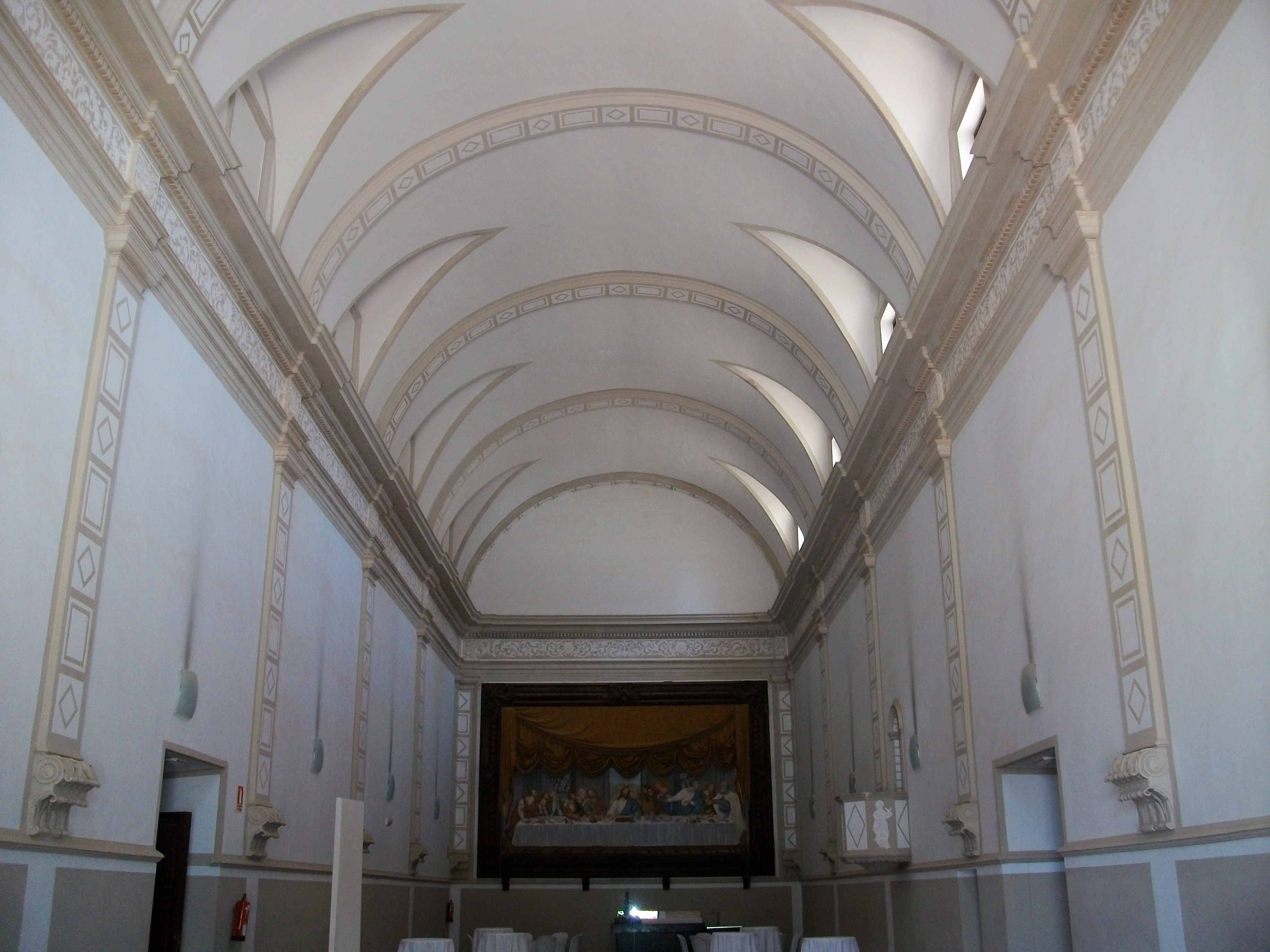 Refectori de la cartoixa d'Ara Christi.